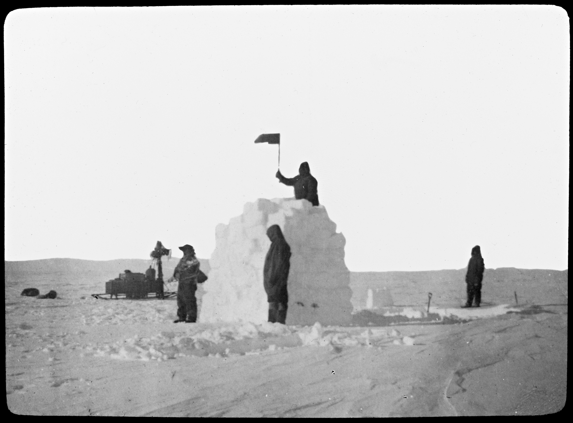 Tittel / Title: Ved depotet på 83 grader sydlig bredde under ferden til Sydpolen Motiv / Motif: Positiv glassplate. Depoet var godt merket bl.a. med flagg. Ferden til polpunktet og tilbake til Framheim tok 99 dager og omtrent 3000 km ble tilbakelagt. Dato / Date: 9. november 1911 Fotograf / Photographer: ukjent / unknown Sted / Place: Antarkits Eier / Owner Institution: Nasjonalbiblioteket / National Library of Norway Lenke / Link: Bildesignatur / Image Number: bldsa_NPRA0779